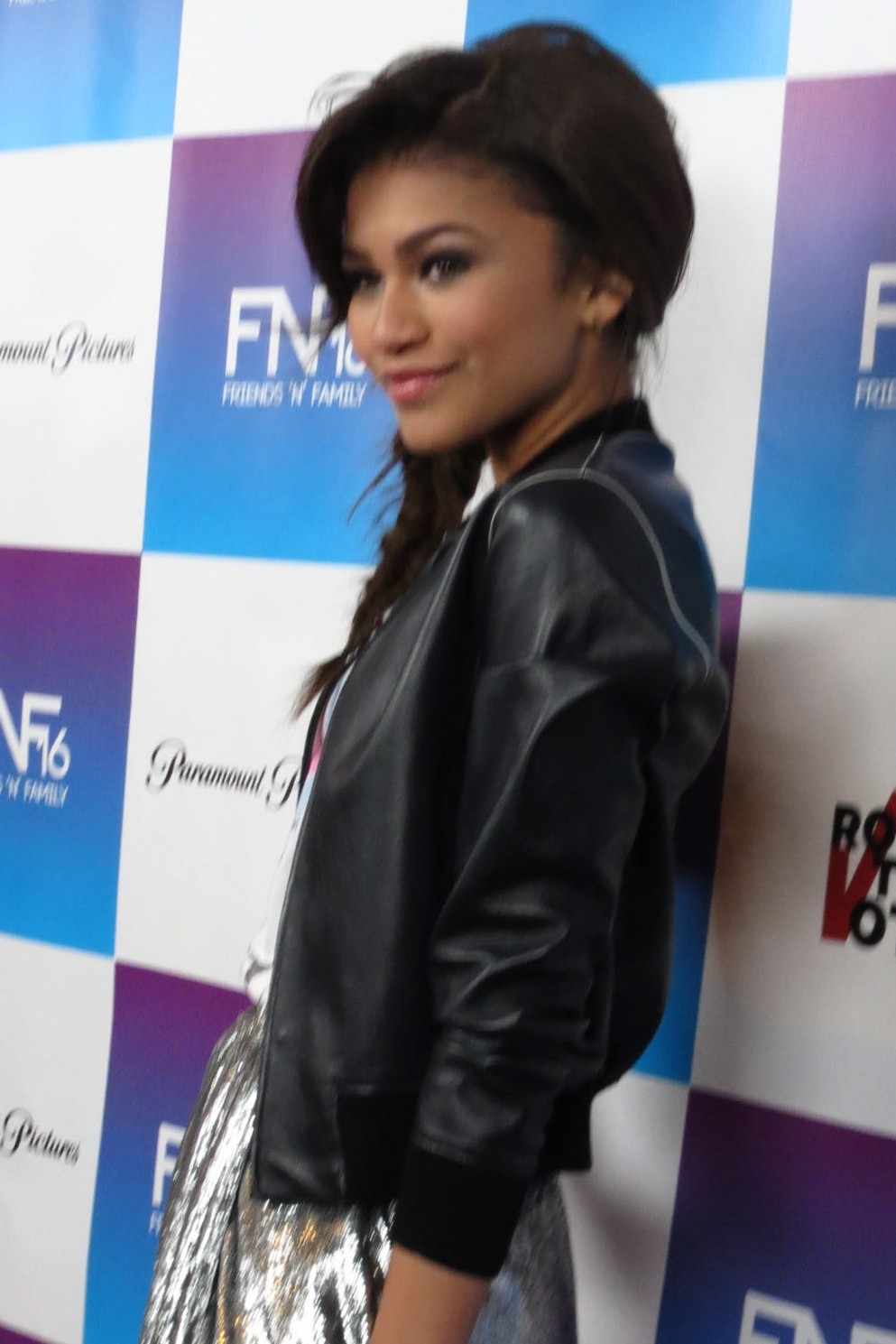 Zendaya